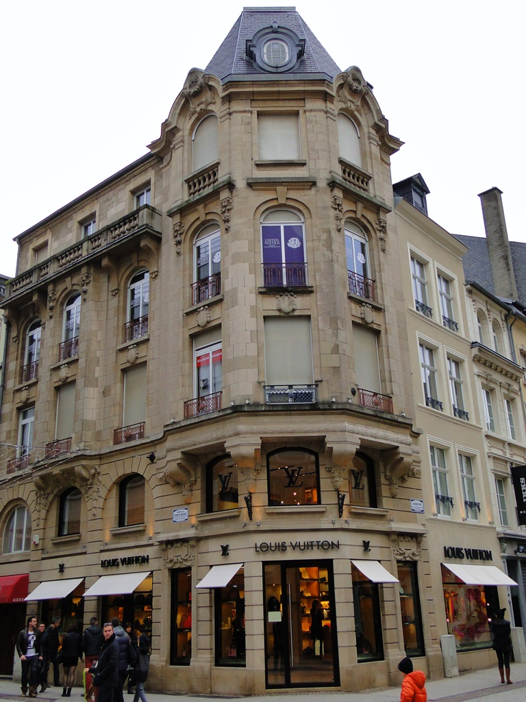 Maison "Victoria House" à Luxembourg, coin Grand Rue et av. de la Porte-Neuve. Construit par Léon Bouvart en 1903-1908.